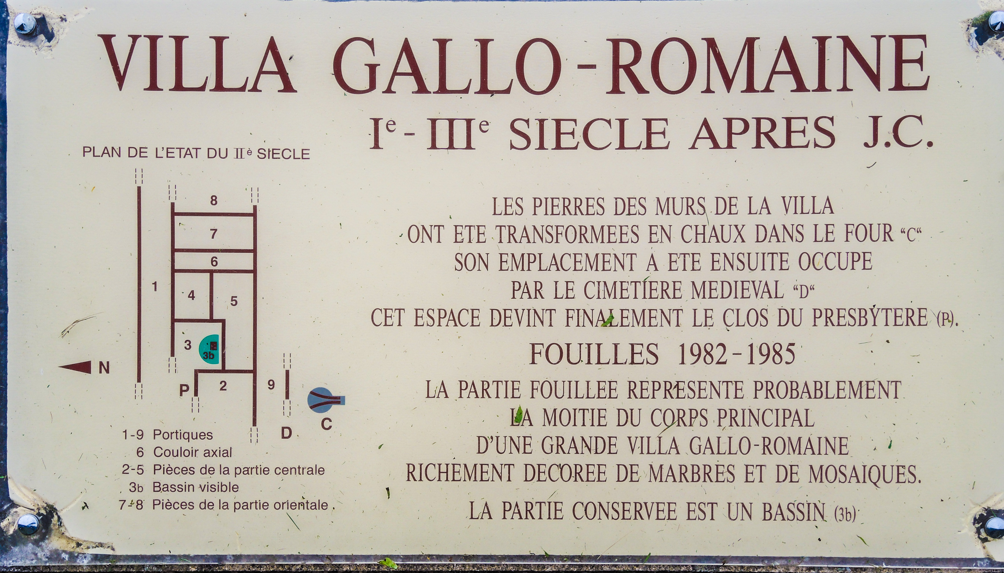 Informations sur la villa Romaine de Goux. Jura.